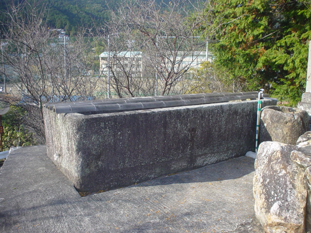 (三重県熊野市にある松葉山天満宮の水槽。2007/12/4 投稿者が撮影